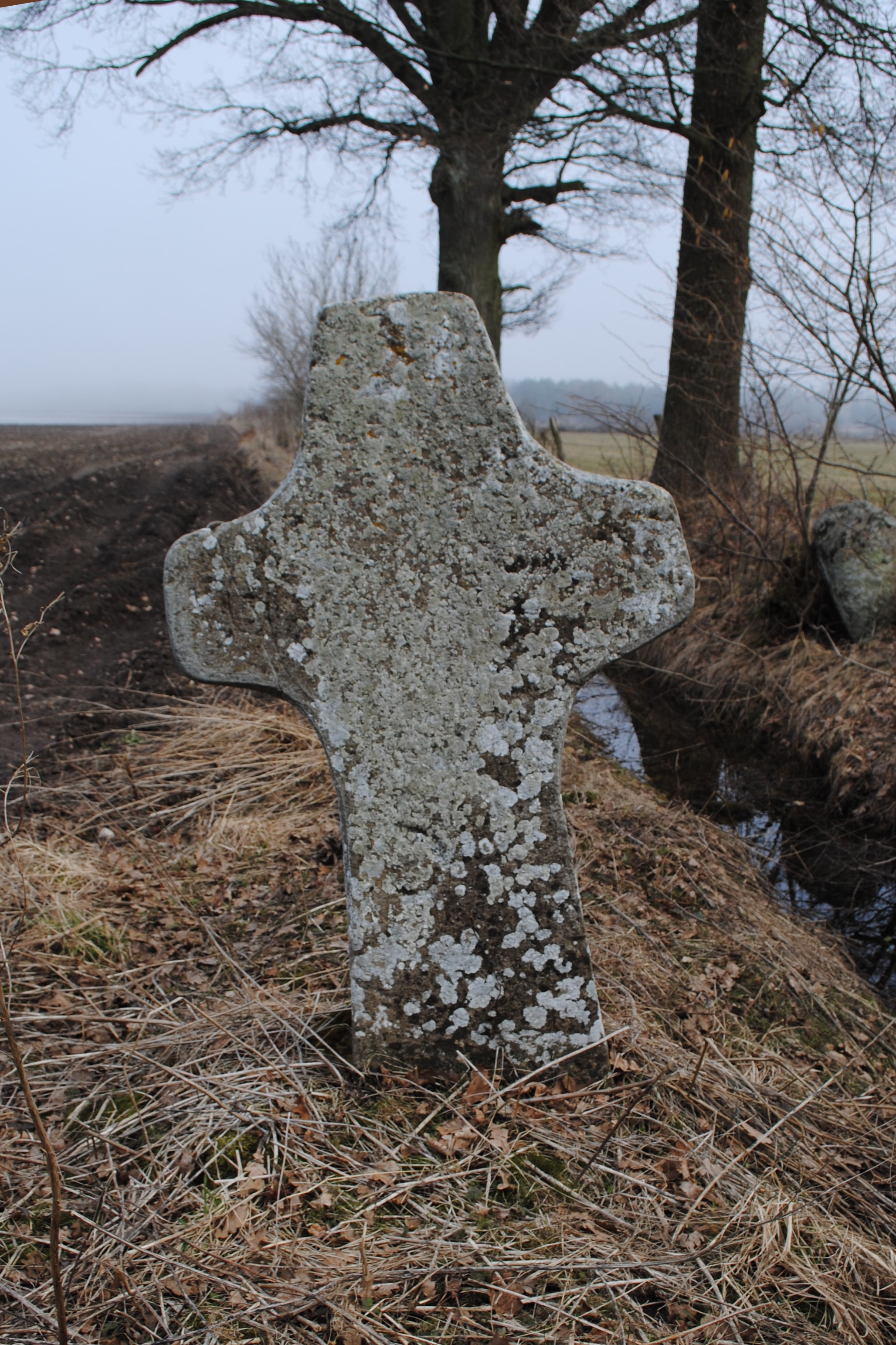 Minneskors i Tjusby, Gärdslösa socken, Öland.